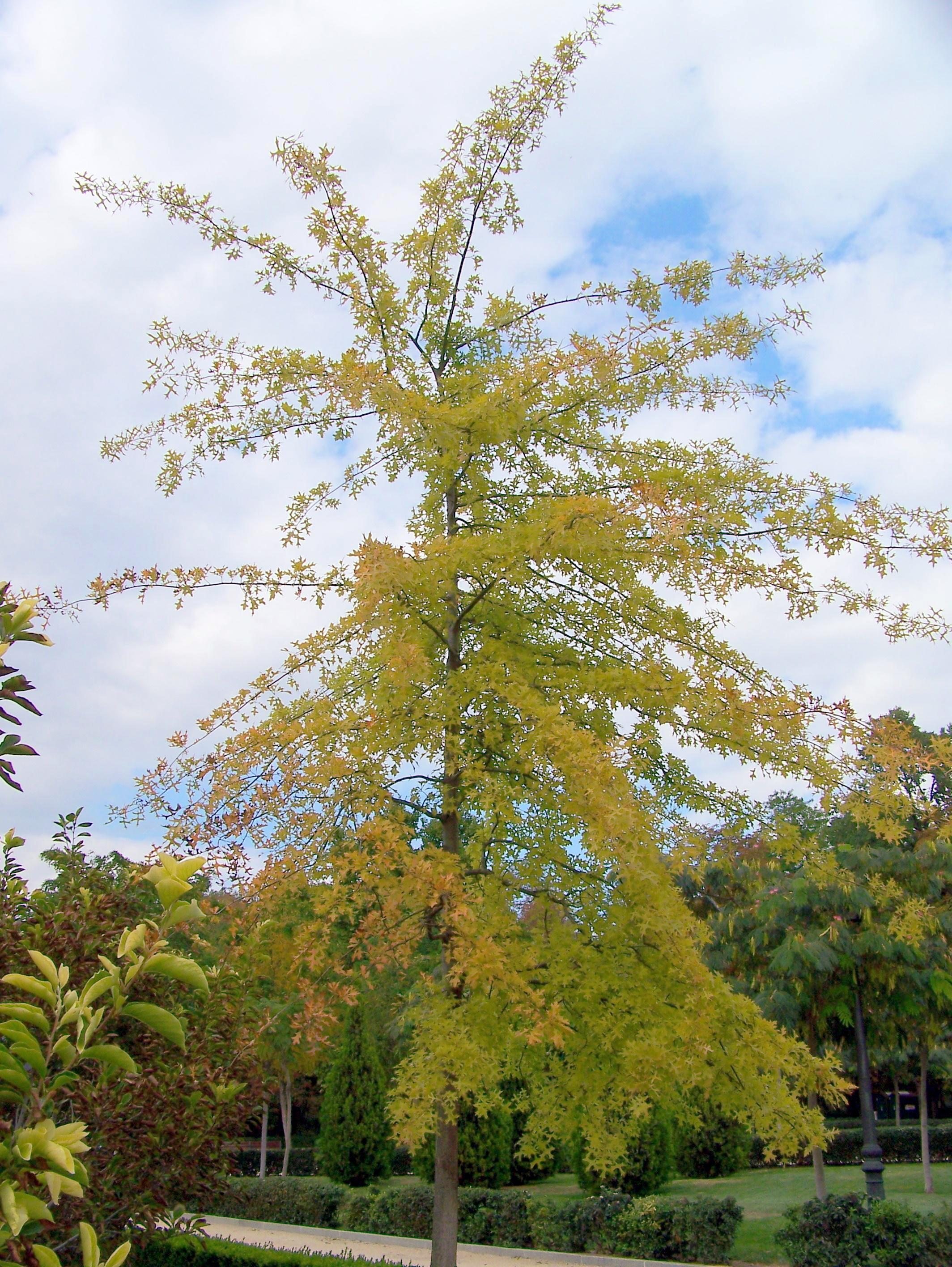 Quercus palustris (Roble de los Pantanos) : Vista general; con las ramas decumbentes, horizontales y ascendientes/verticales - respectivamente de abajo hacía arriba - Parque del Buen Retiro, Madrid (España).